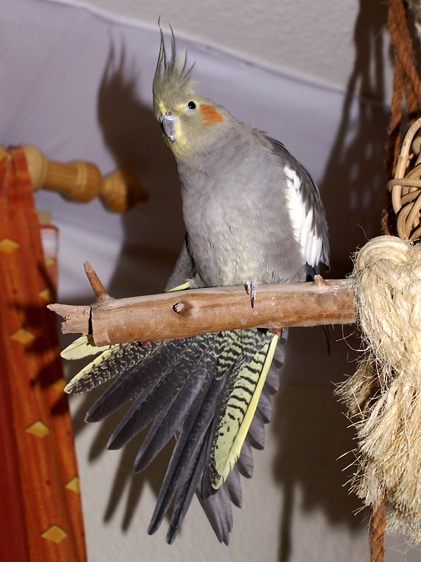 Nymphensittich-Henne-Wildfarben